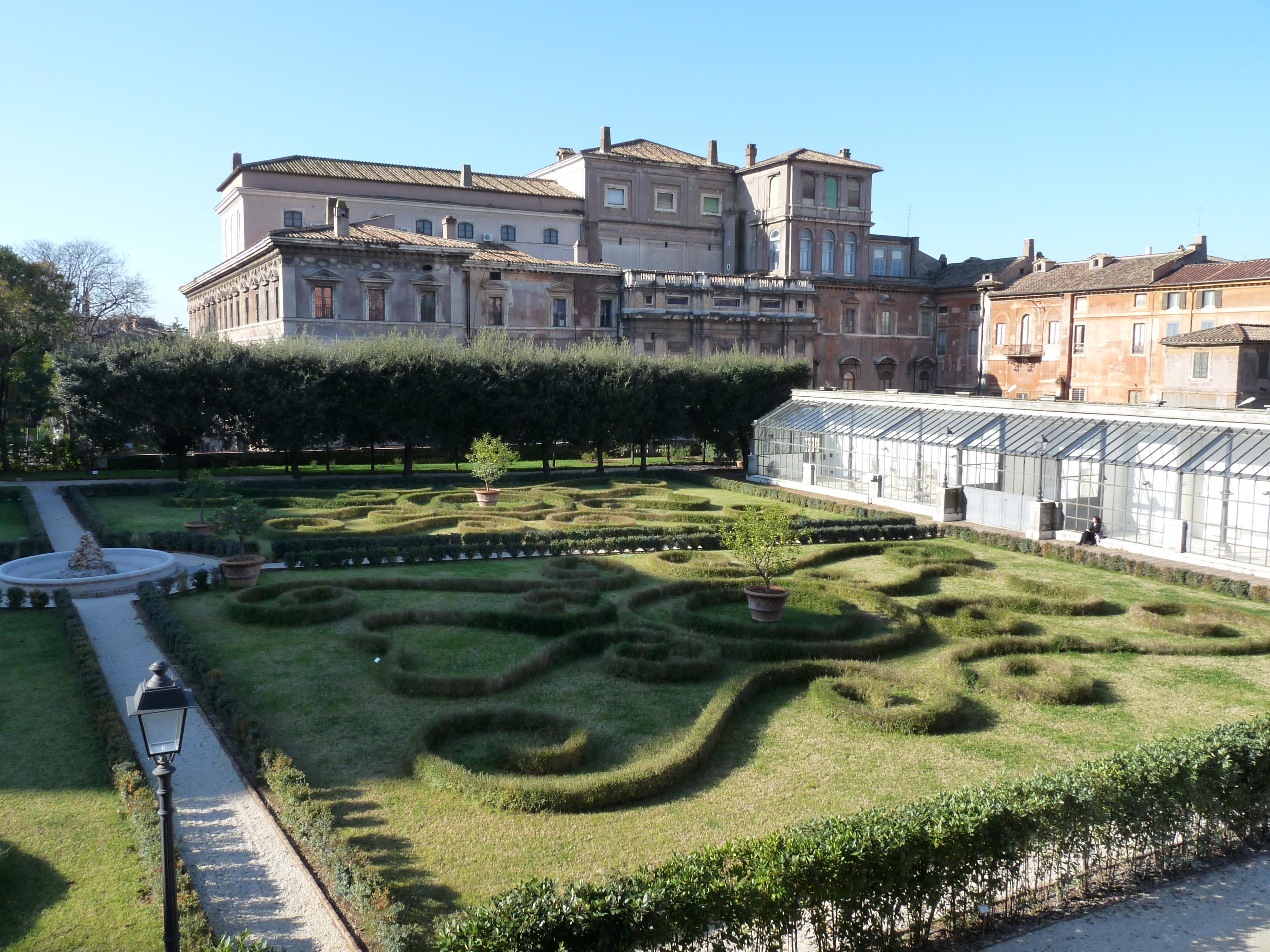 Palacio Barberini (Roma, Italia)